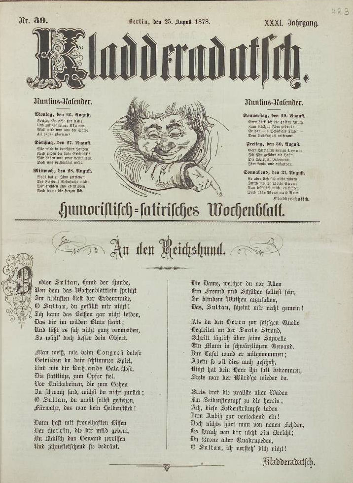 Kladderadatsch Titel der Ausgabe Nr. 39 vom 25. August 1878 mit dem Gedicht: „An den Reichshund“